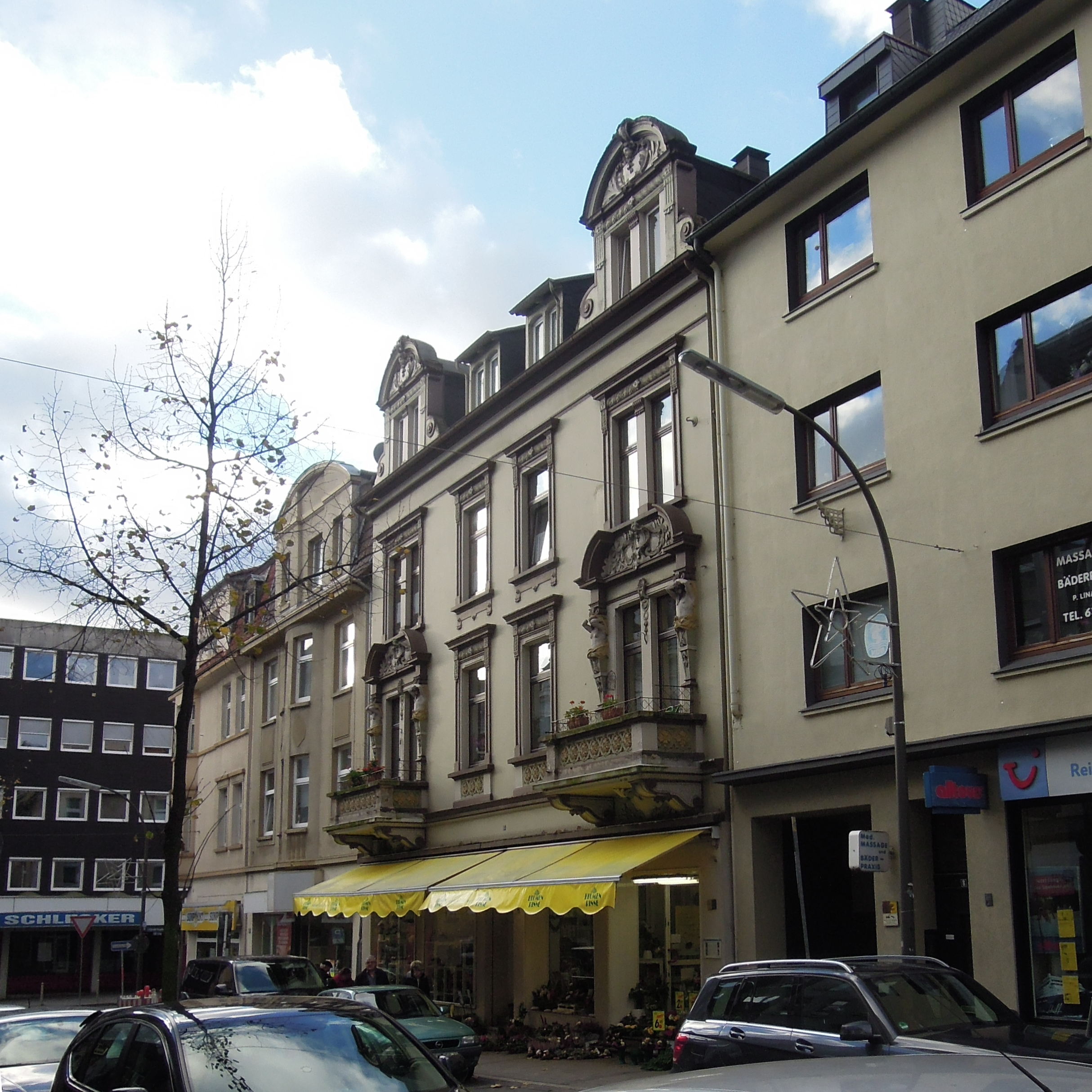 Lage des Stolpersteins Dortmund Limbecker Straße 6 Olga Dannenbaum